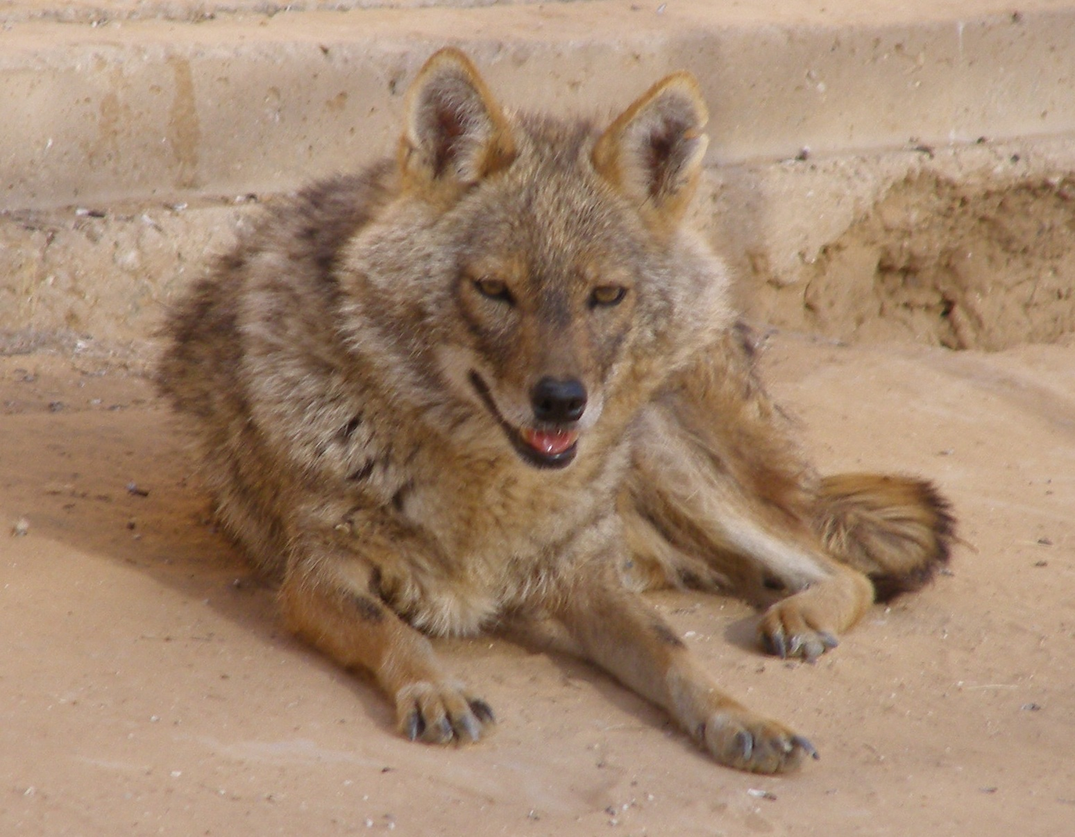 Canis aureus (Golden Jackal), Chai Negev, Revivim, Israel.